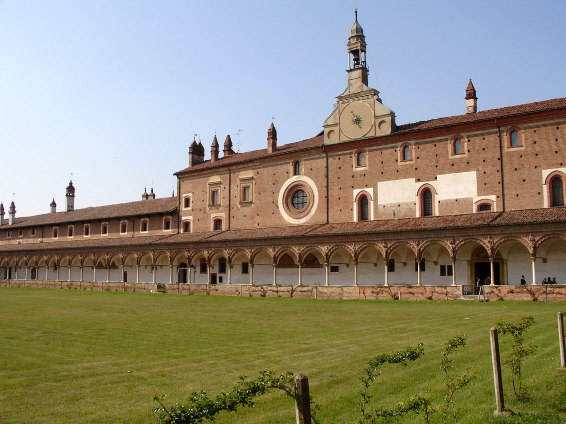 Chiostro grande della Certosa di Pavia.